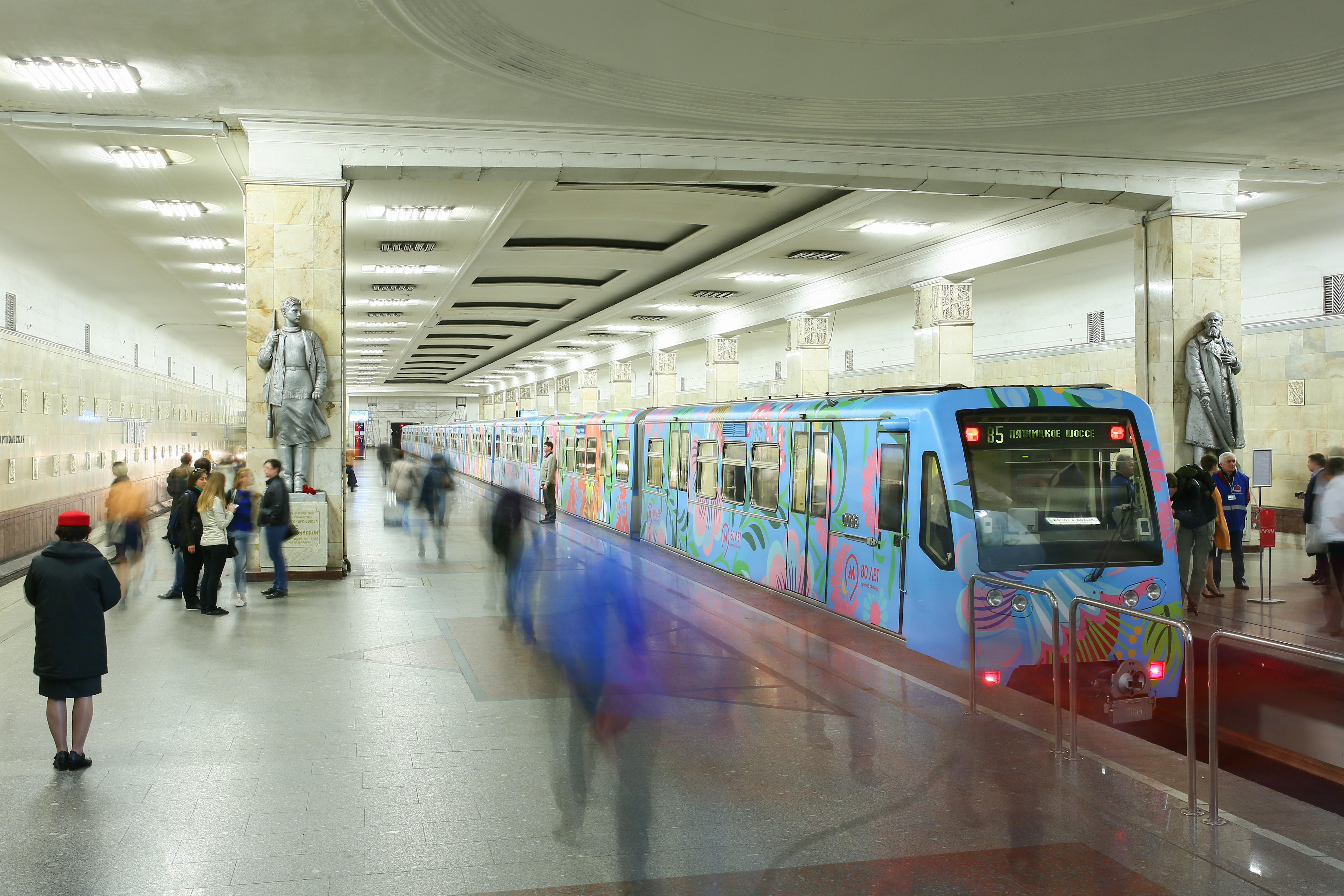 Электропоезд метро 81-740/741 «Краски метро» на среднем пути станции «Партизанская»